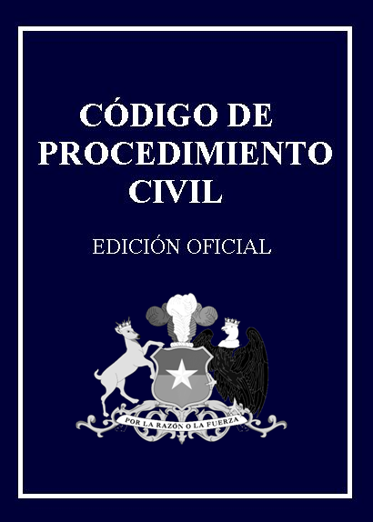 Código de Procedimiento Civil de Chile